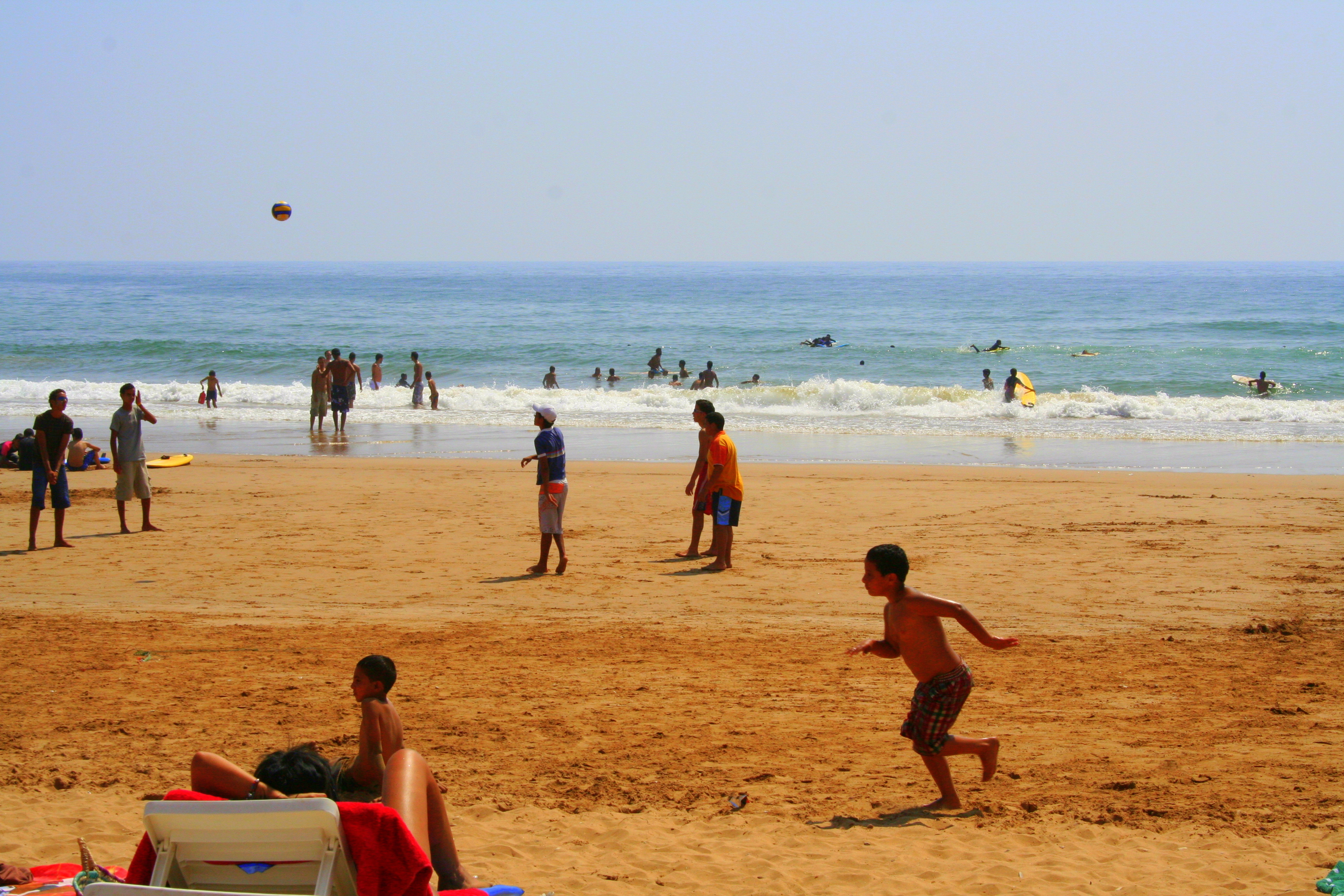 Tamraght